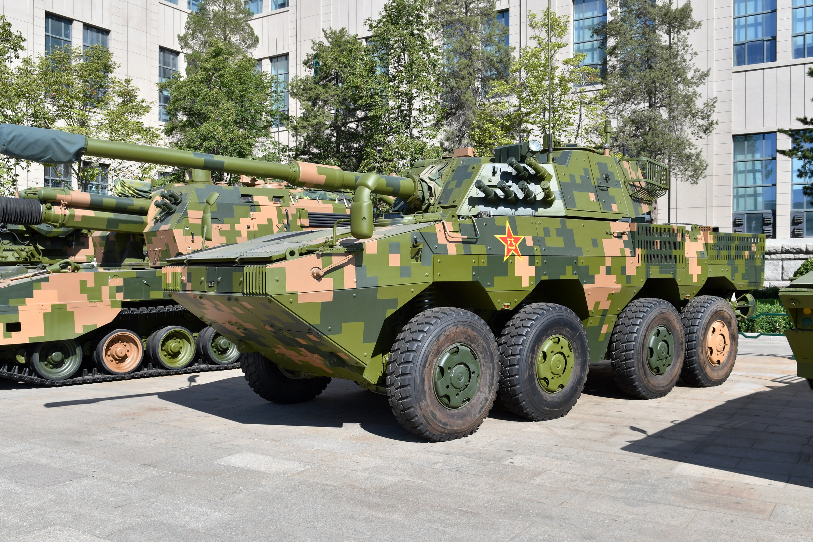 ZTL-11 轮式装甲突击车，拍摄于中国人民革命军事博物馆。